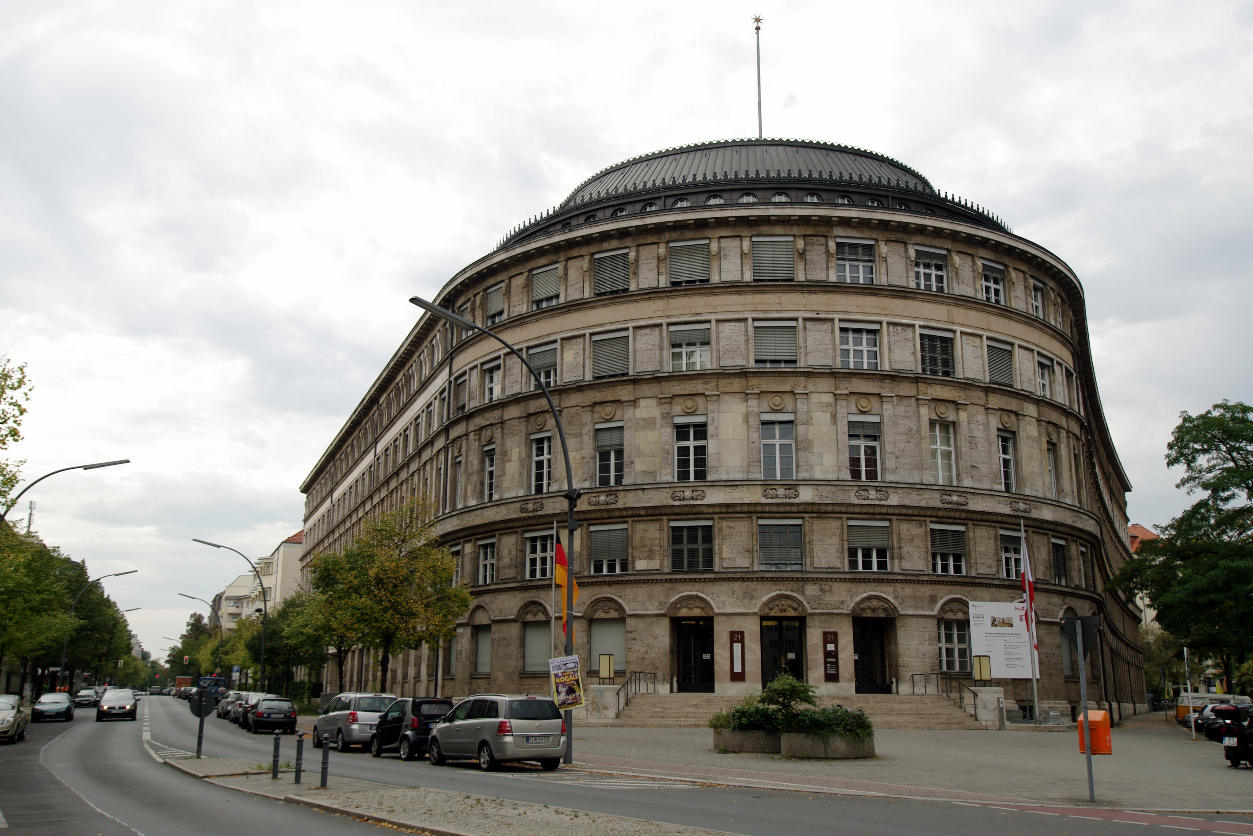 Nordsternhaus